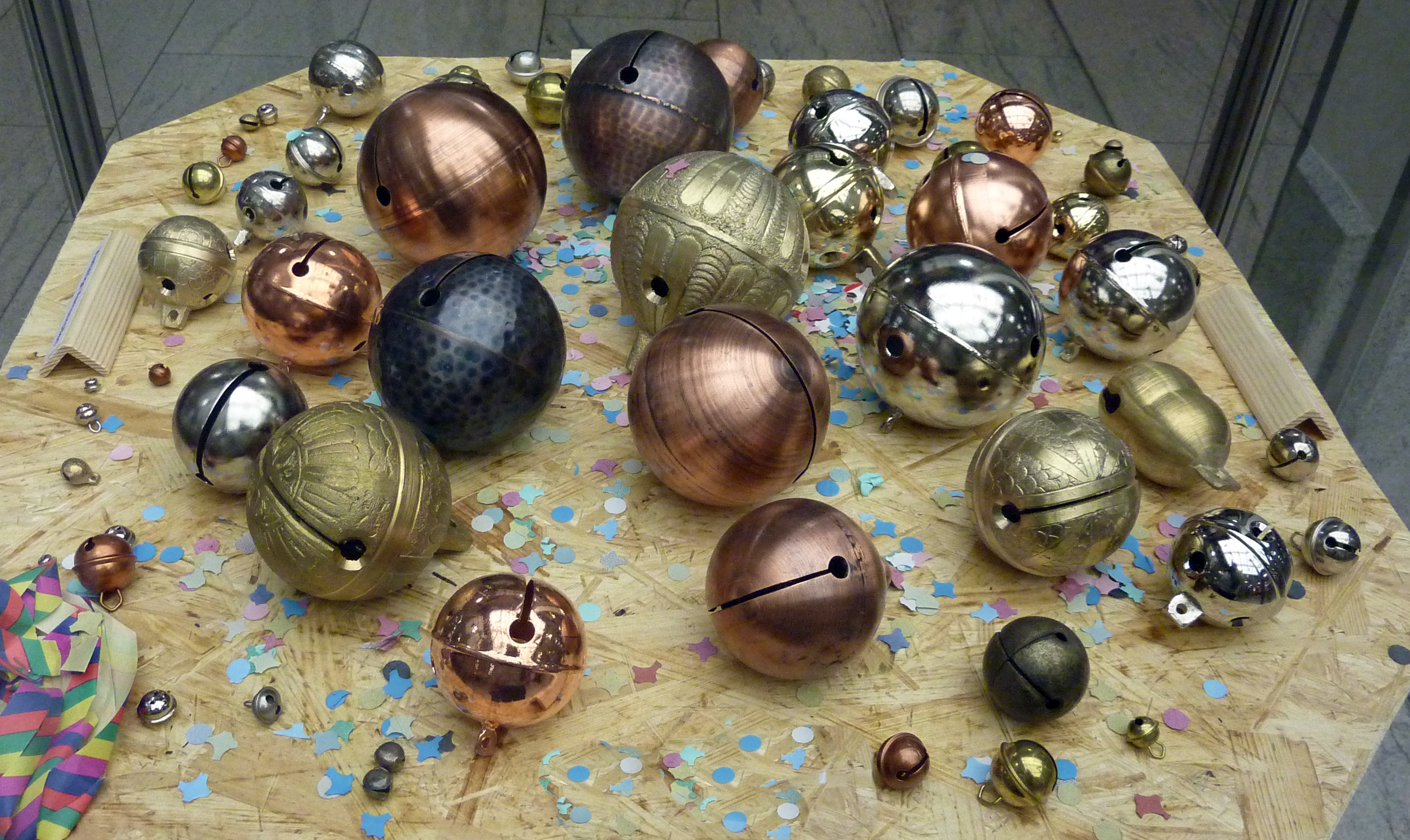 Vielfältige Narrenrollen, Exponate aus der Sammlung Peter Scharte aus der Ortenau, vom 14. Januar bis 13. Februar 2013 im Einkaufszentrum Schwarzwald City (Freiburg) unter dem Titel „Narrenrequisiten - vielfältig und kreativ“ ausgestellt.